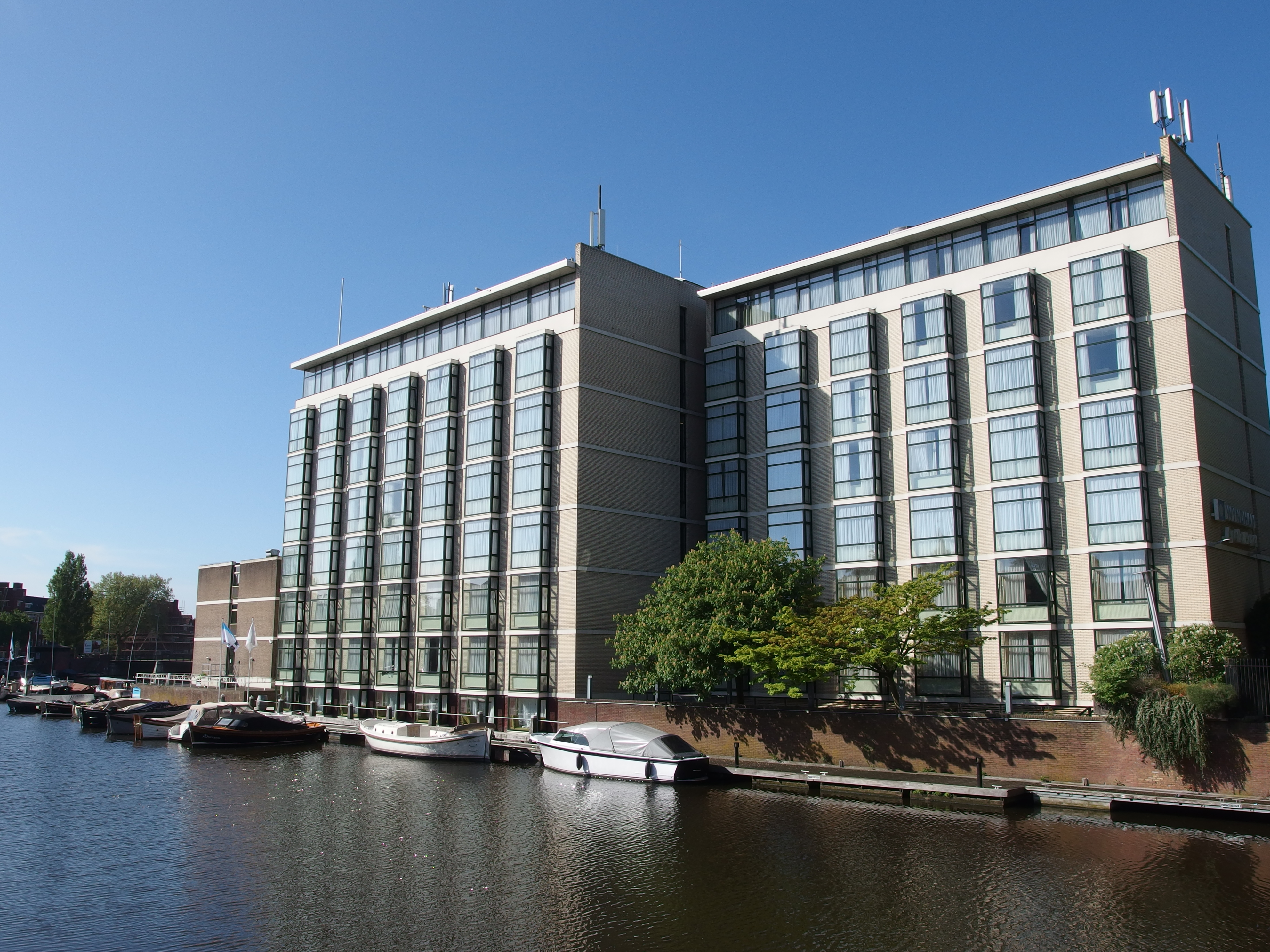 Apollo Hotel waterzijde